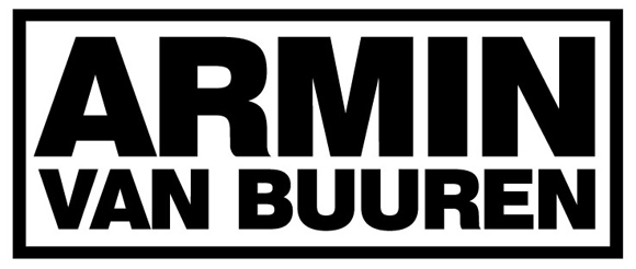 logo 1